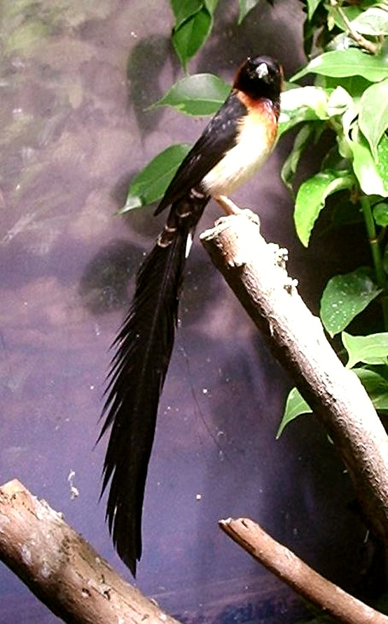 Vidua obtusa, male